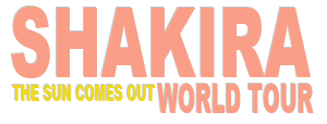 Logo diseñado a partir de la fuente original del poster que promocionó en un principio al Sale el Sol World Tour.